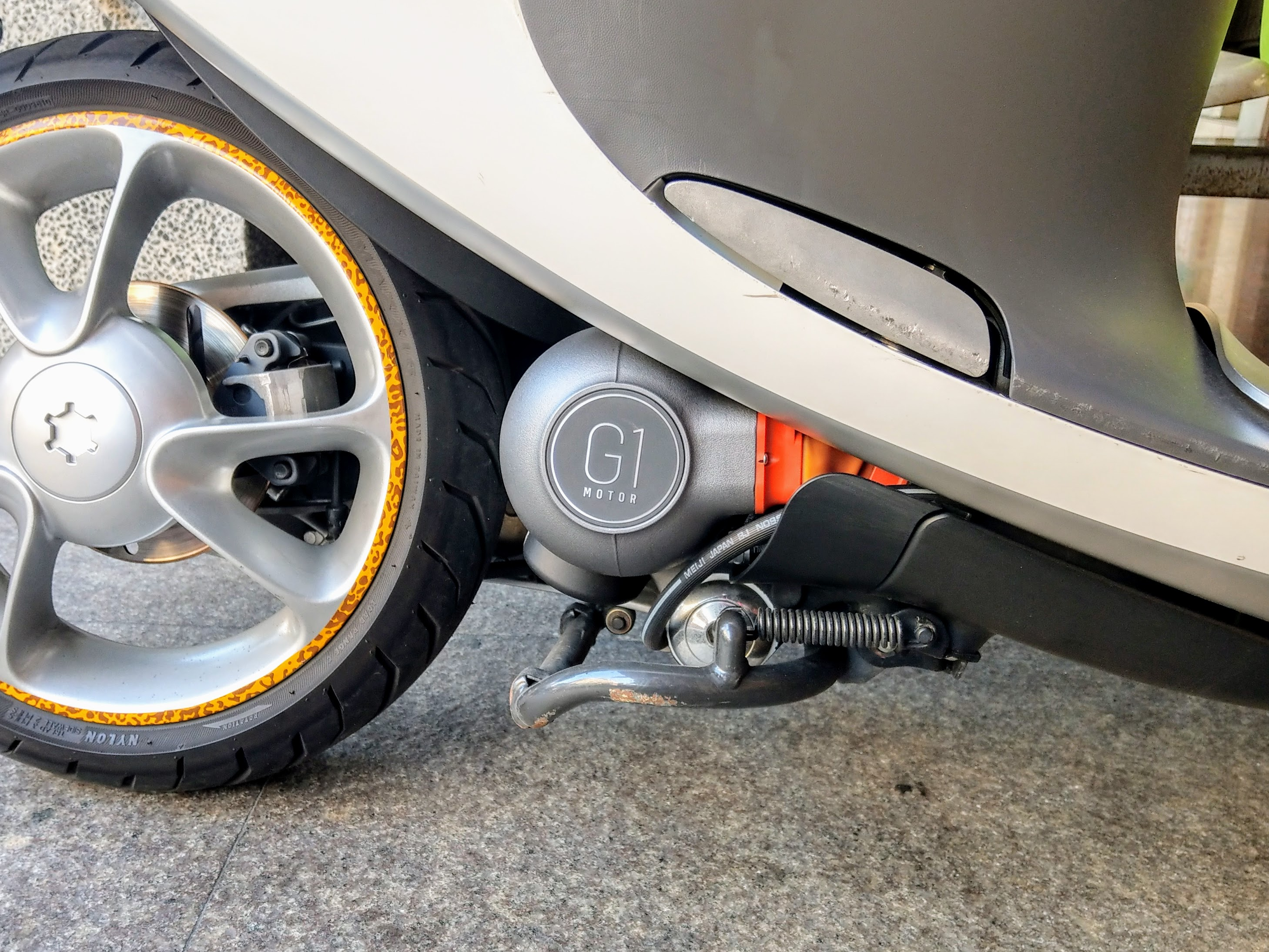 Gogoro 的 G1 馬達外觀。